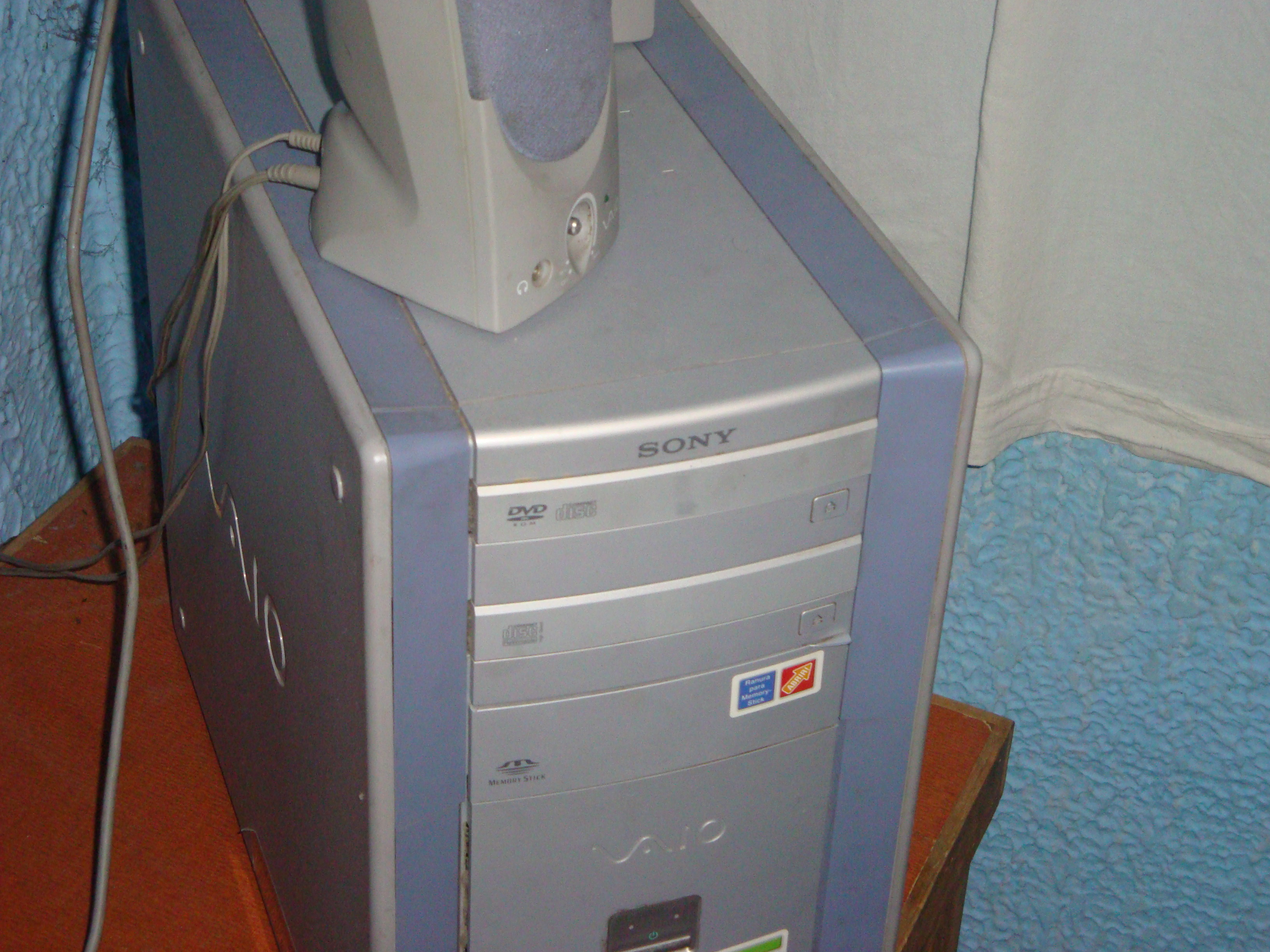 gabinete de una vaio